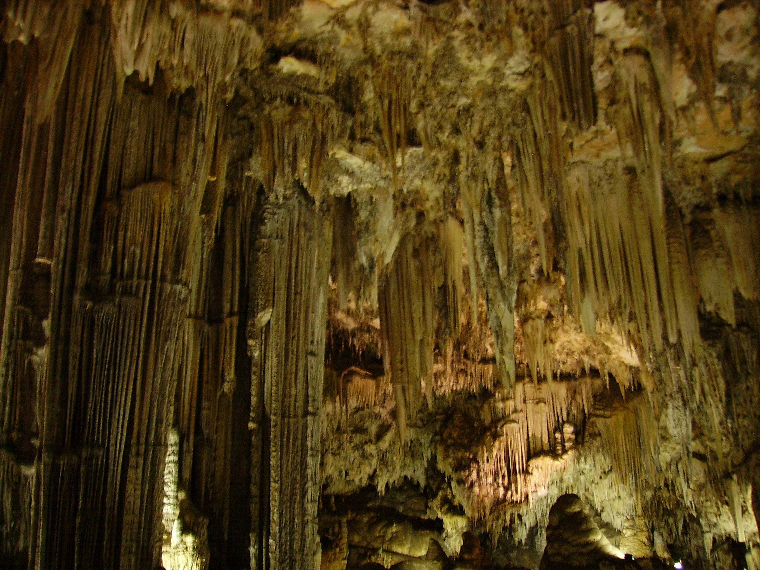 Cueva de Nerja